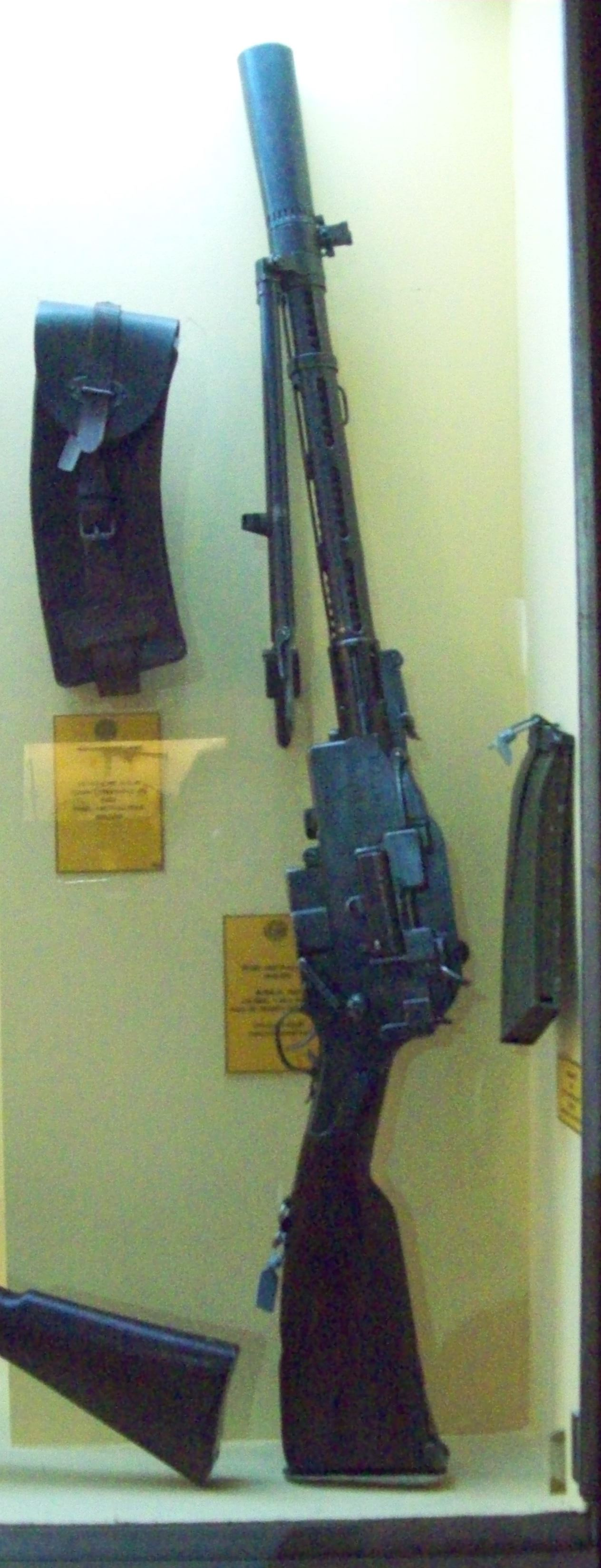 Armamento expuesto en el Museo de Armas de la Nación, ciudad de Buenos Aires, Argentina 2014.